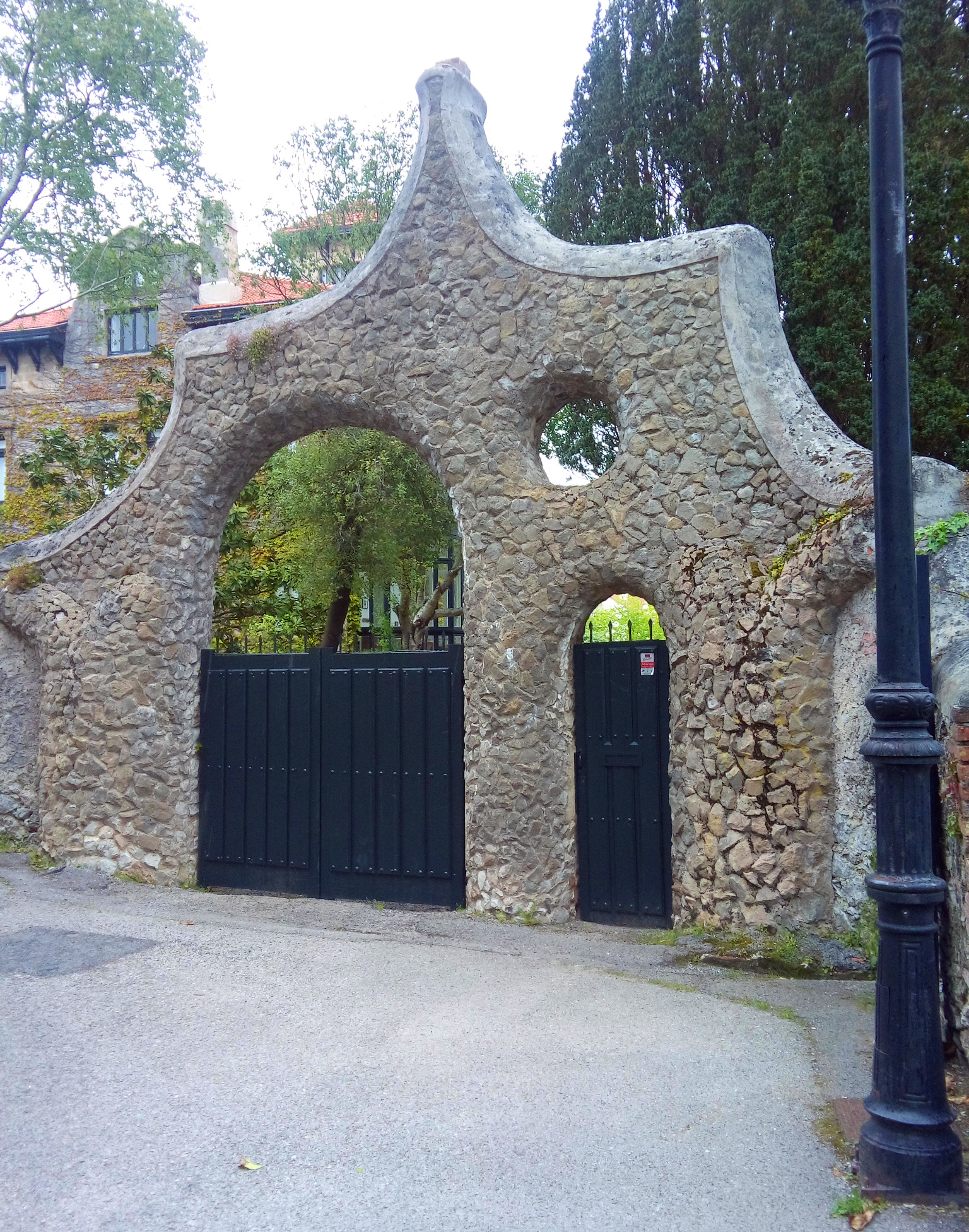 Puerta del Moro o de los Pájaros, diseñada por Antoni Gaudí